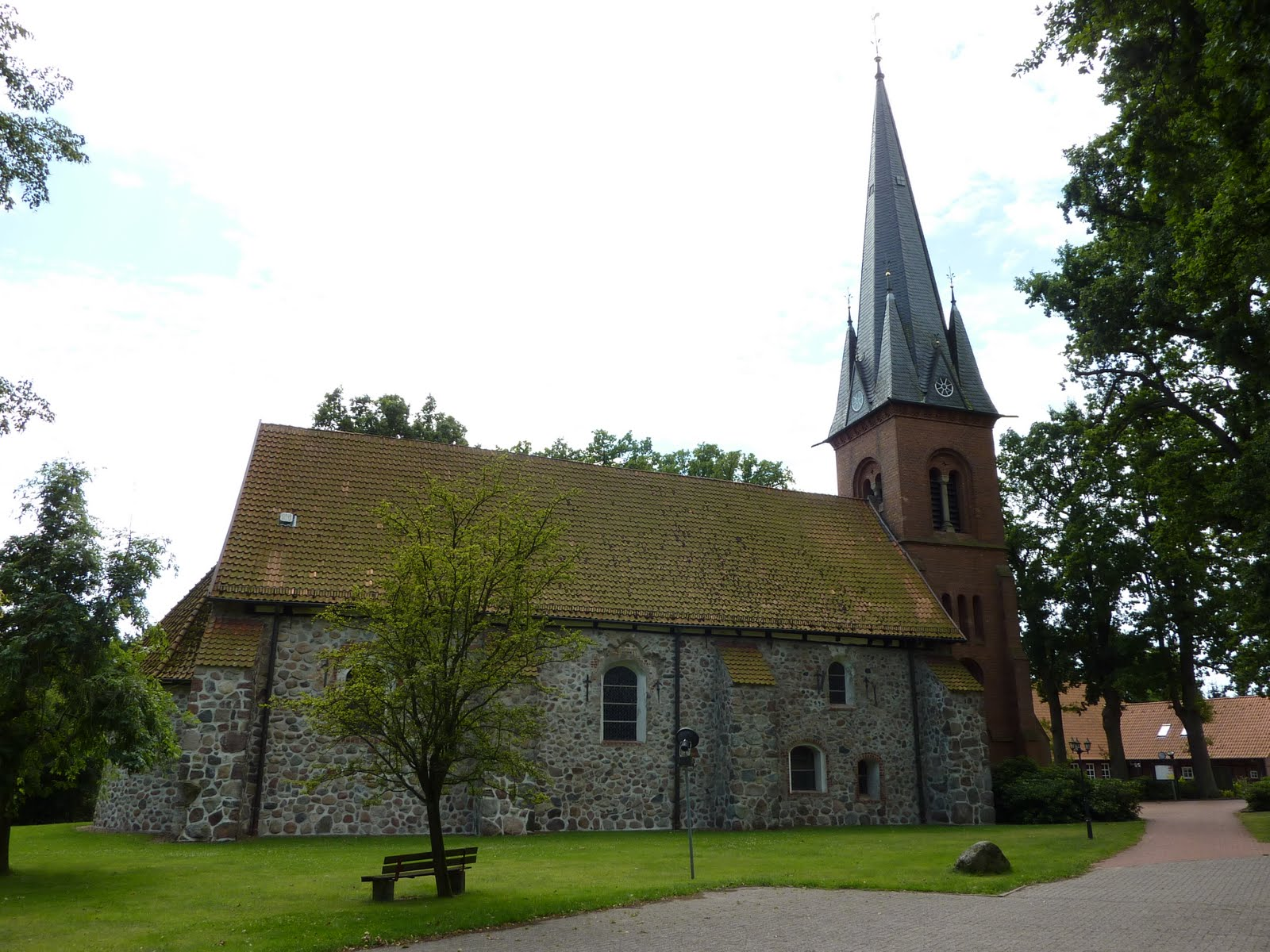 Heeslingen, Landkreis Rotenburg (Wümme), Niedersachsen, Feldsteinkirche St. Vitus